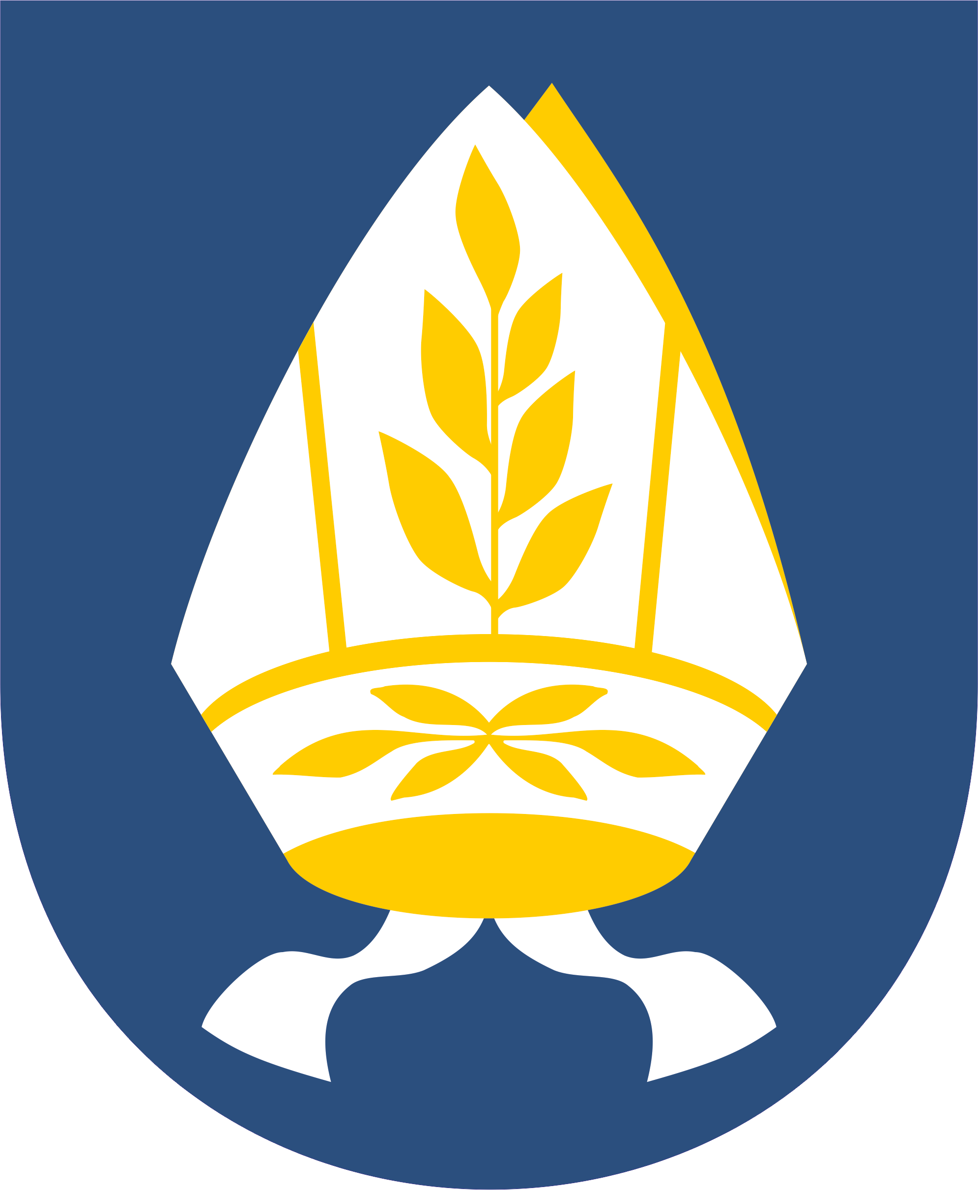 Herb Miasta i Gminy Pelplin